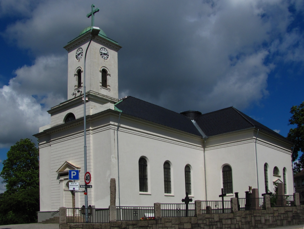 Immanuels kirke i Halden